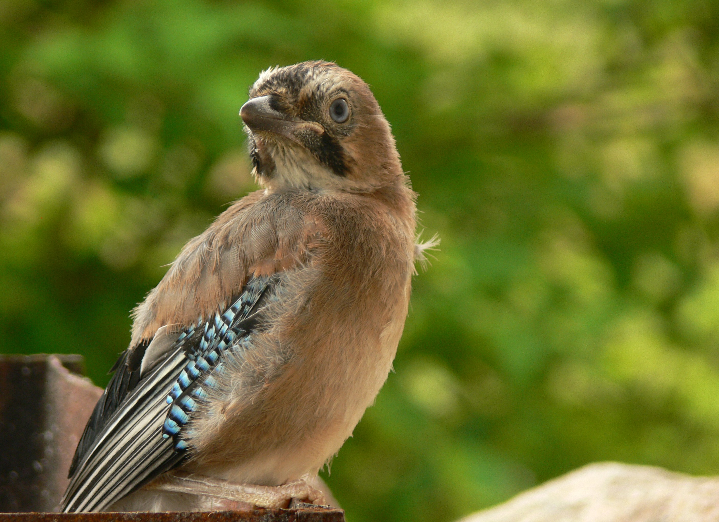 Leevaku, Põlvamaa